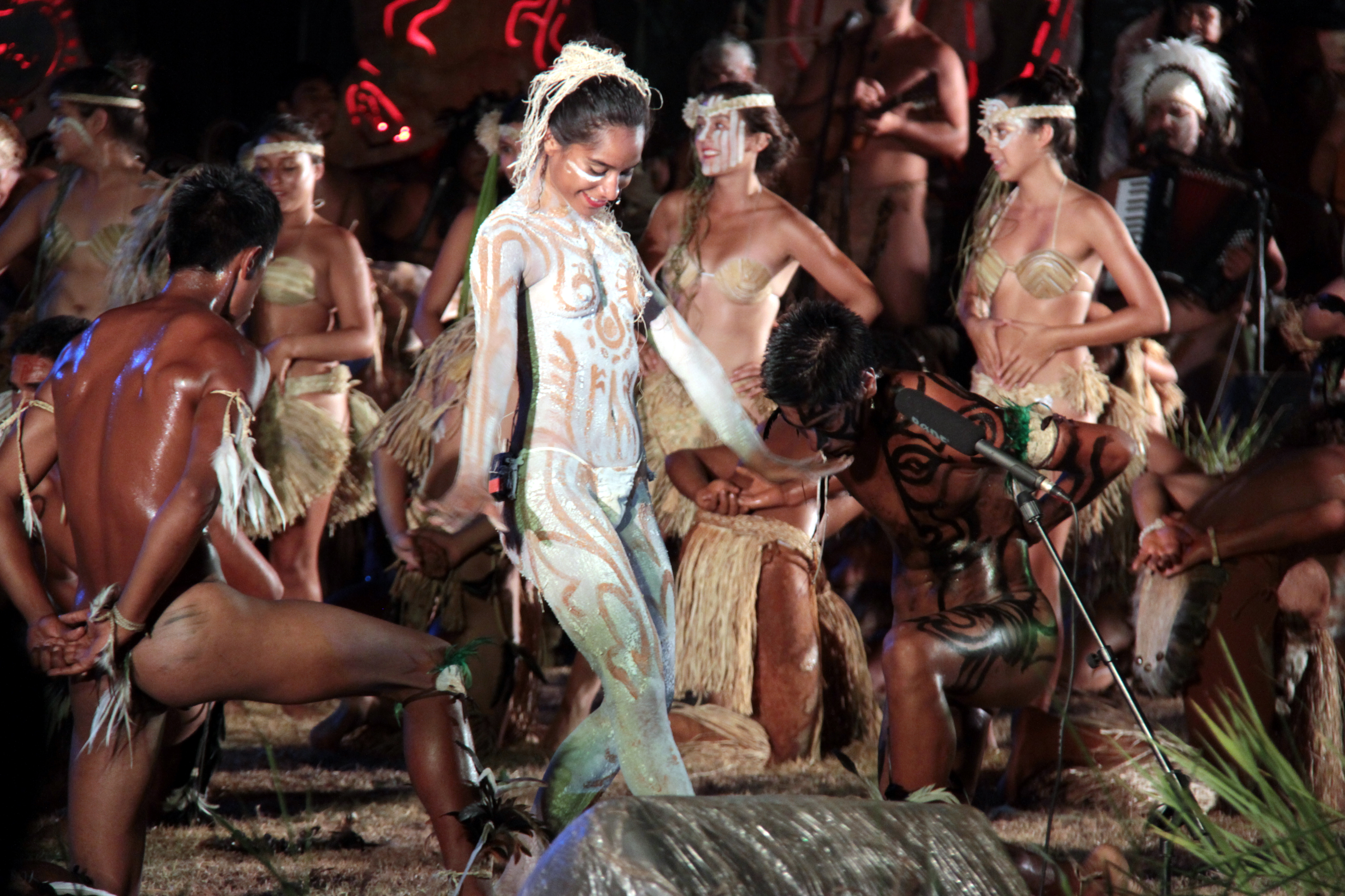 festival tapati sur l'ile de paques